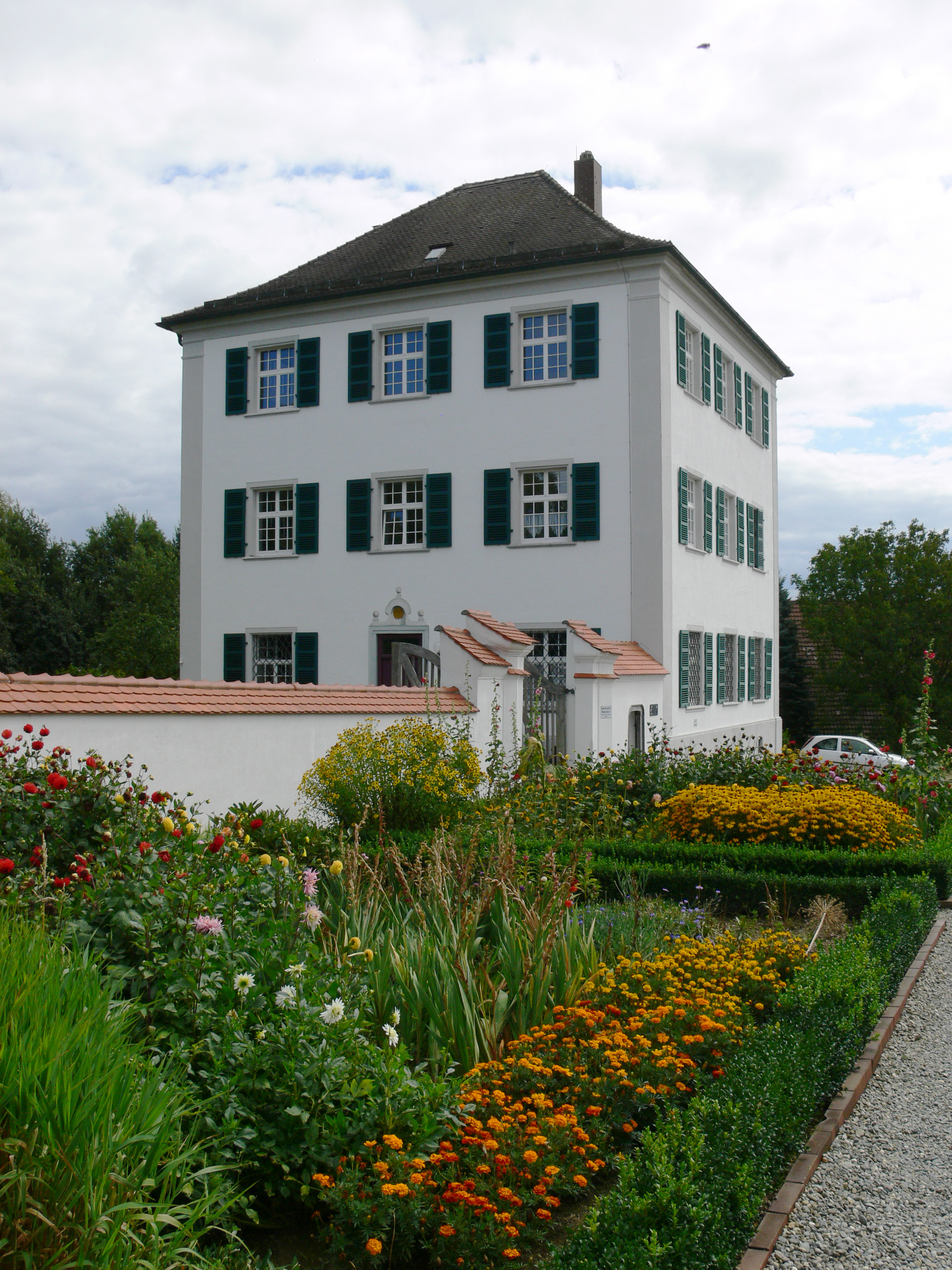 Stafflangen, Stadt Biberach an der Riß Pfarrhaus (erbaut als freiflügelige Anlage von Jacob Emele, später teilweise abgebrochen)